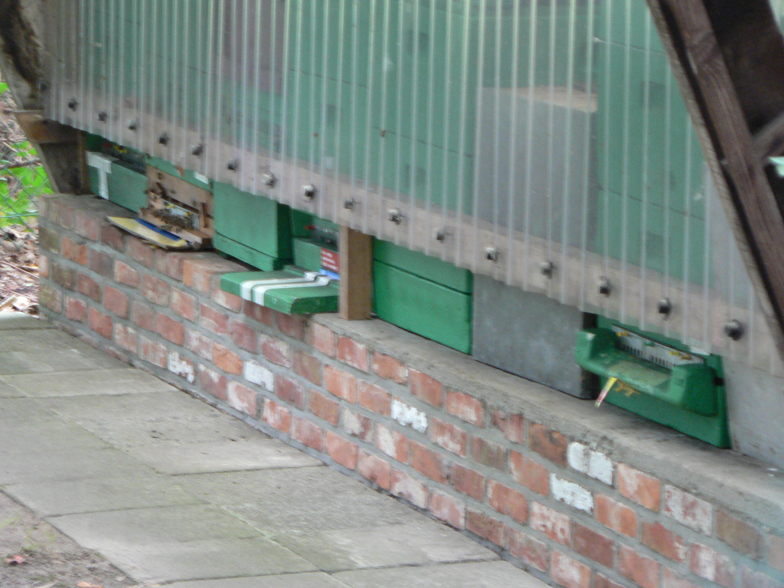 Bijenkasten, De Linde, Retie